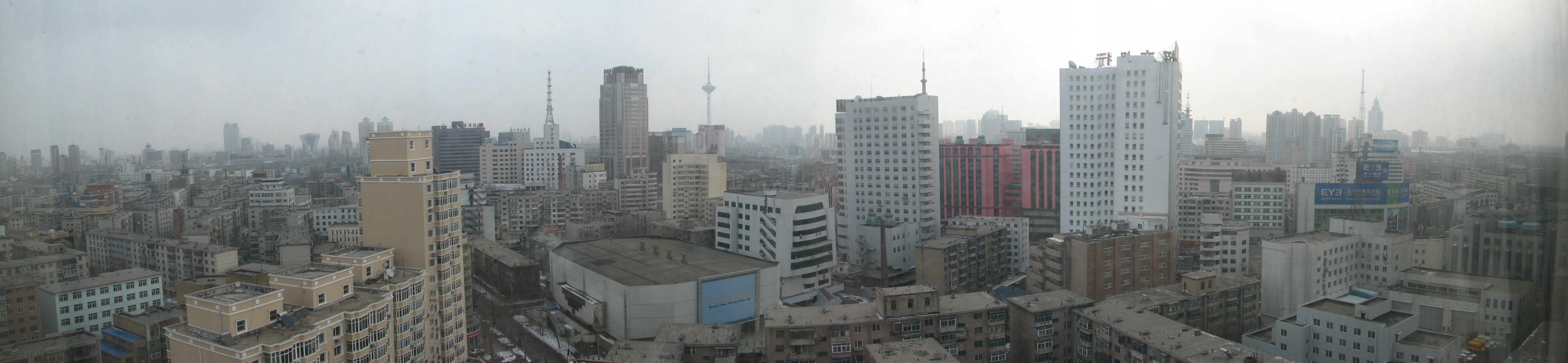 Shenyang Panorama